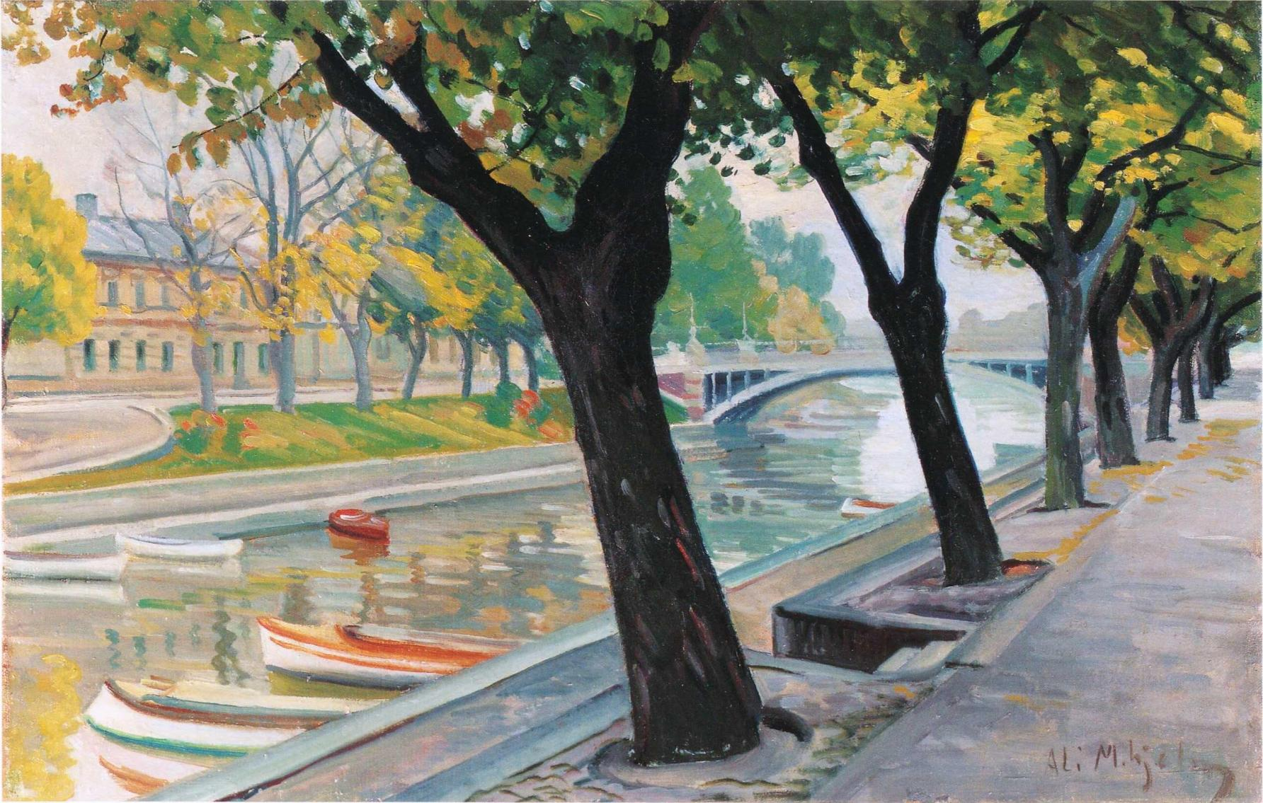 Ali Munsterhjelmin maalaus Aurajoesta Turussa. Kuuluu Taidesäätiö Meritan kokoelmiin.